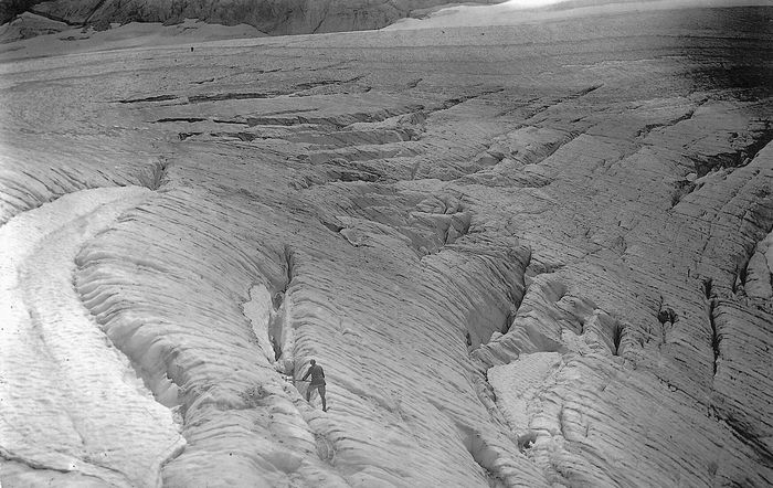 Površje Triglavskega ledenika z značilnimi in obsežnimi ledeniškimi razpokami